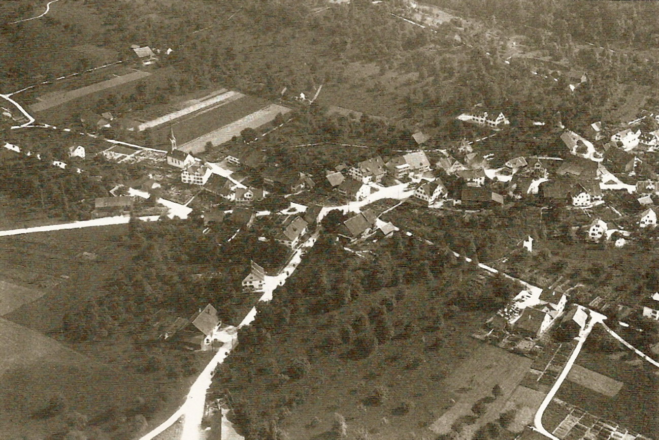 Zürich-Schwamendingen (Switzerland), aerial photography by Walter Mittelholzer (1894–1937)